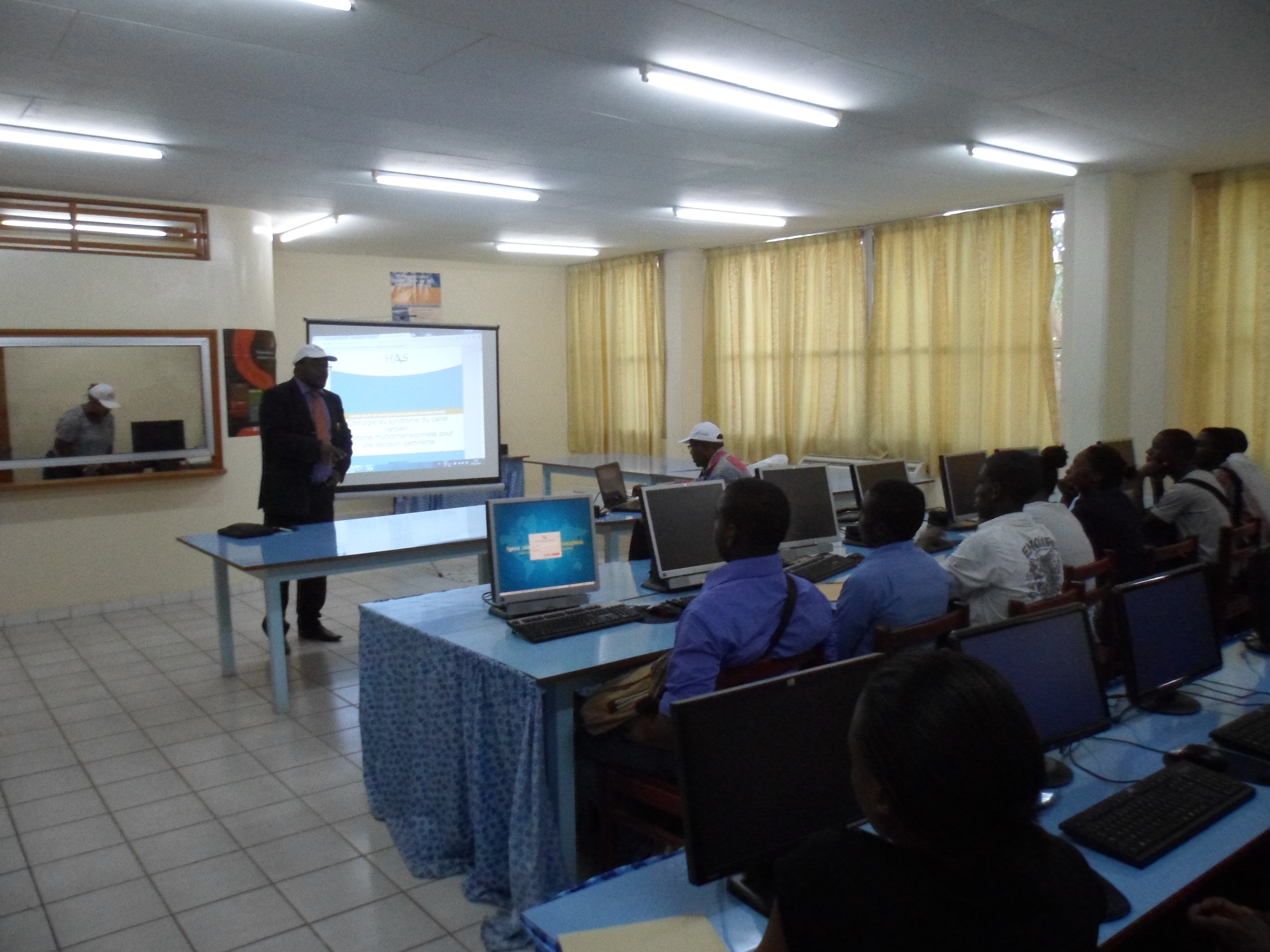 Transfert des connaissances aux impétrants aux cnf